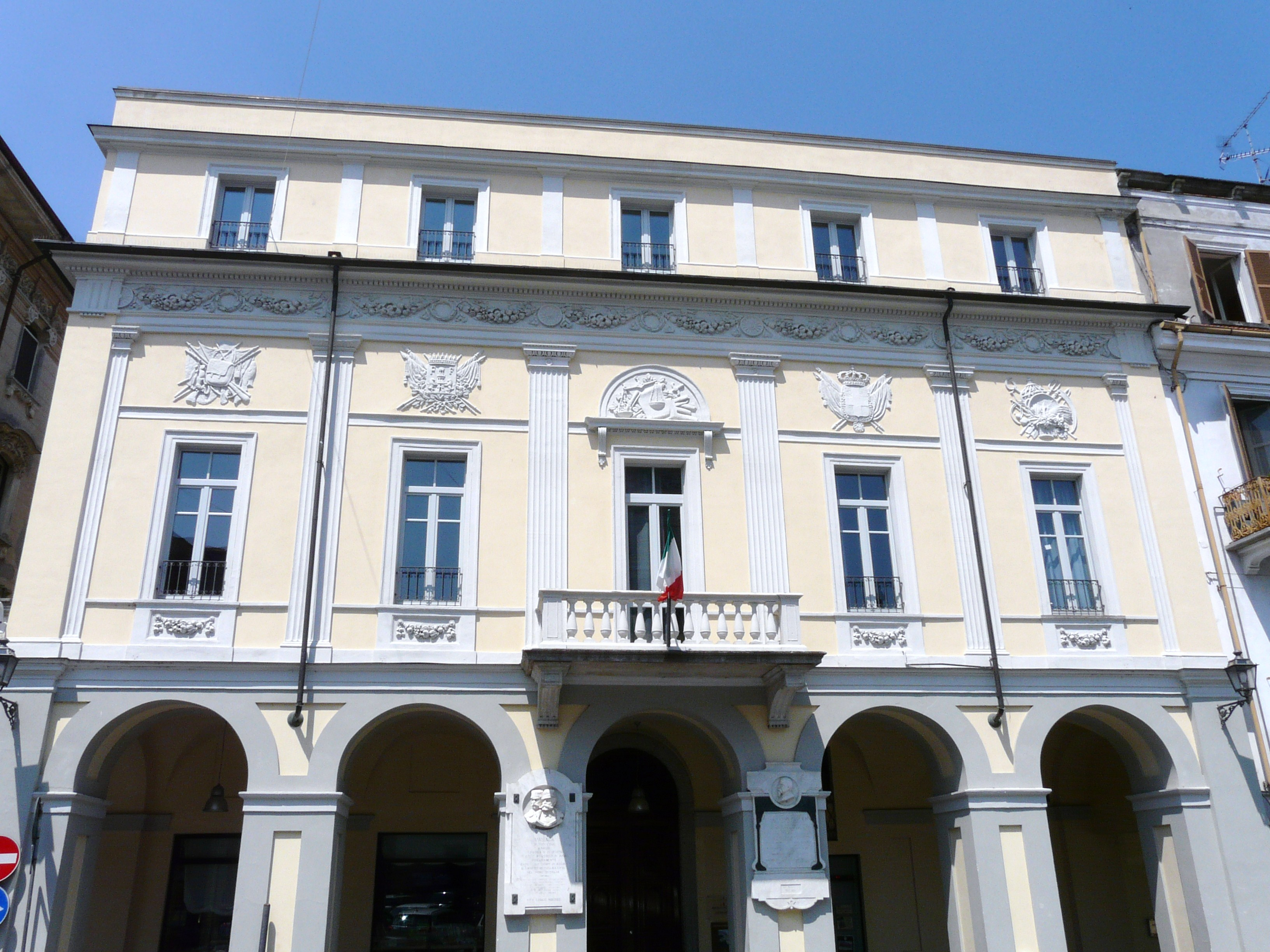 Palazzo Valentino, Valenza, Piemonte, Italia